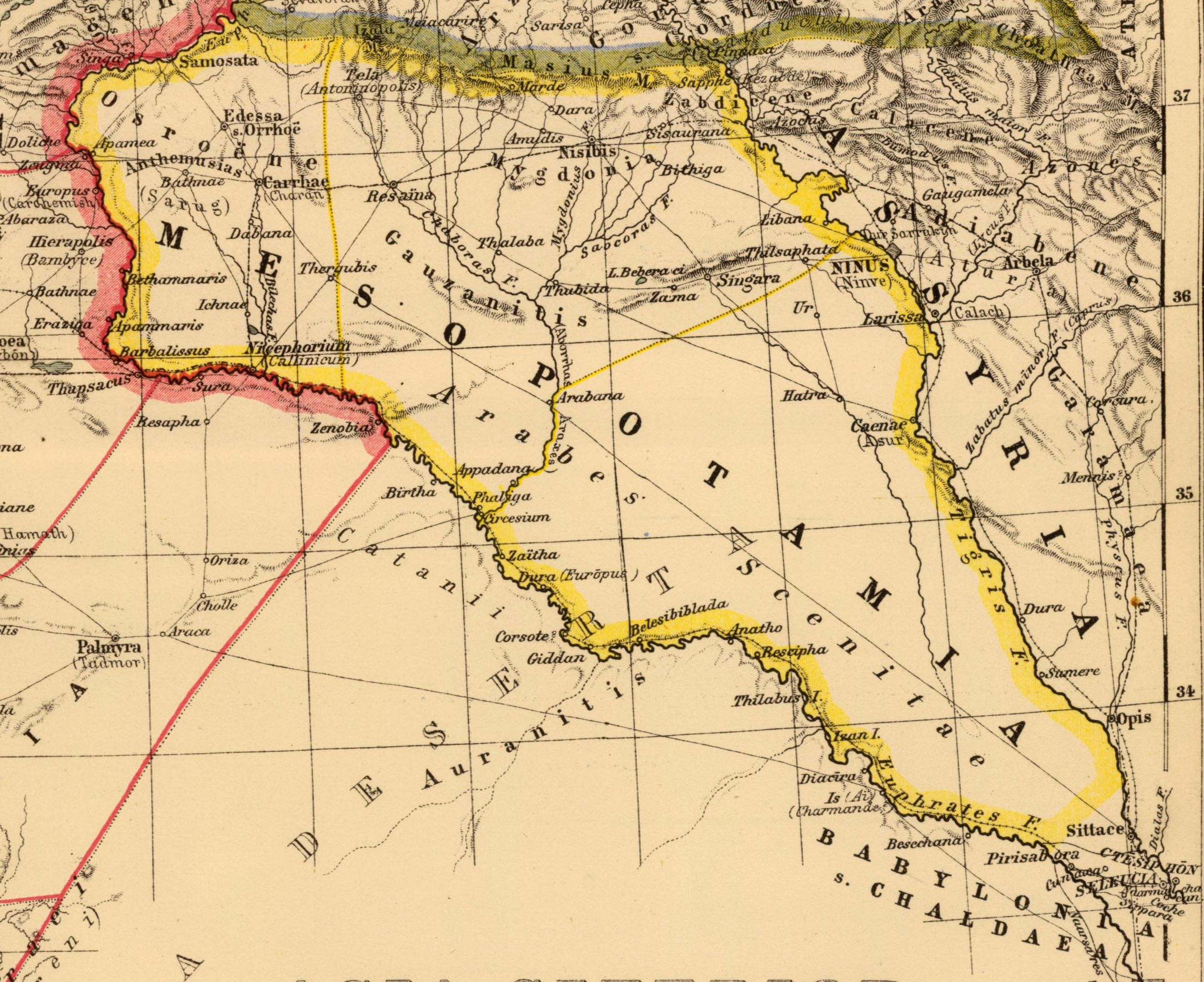 Mesopotamia. Asia citerior. Auctore Henrico Kiepert Berolinensi. Geographische Verlagshandlung Dietrich Reimer (Ernst Vohsen) Berlin, Wilhemlstr. 29. (1903)